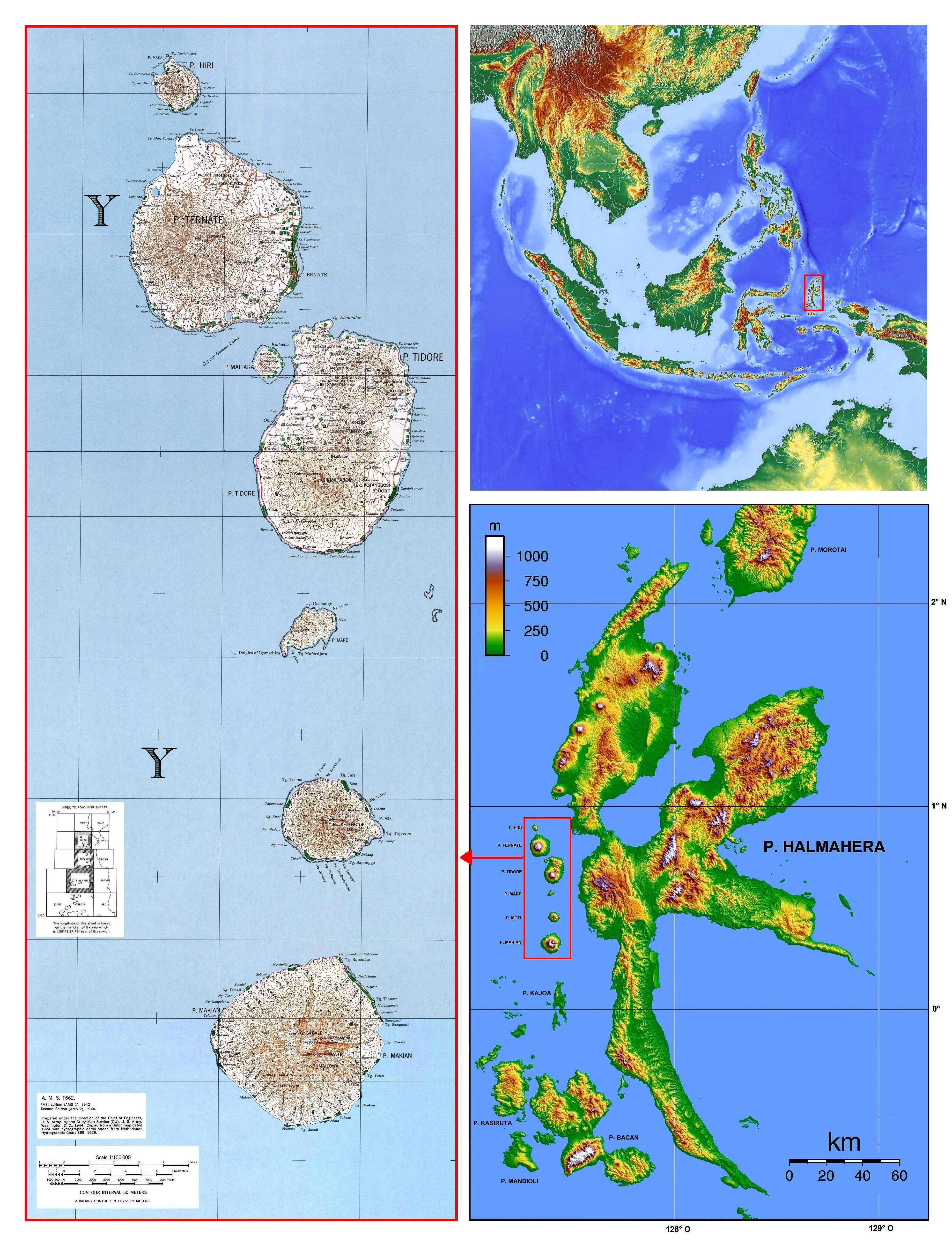 Inselkette von Ternate bis Makian vor der Westküste der indonesischen Insel Halmahera